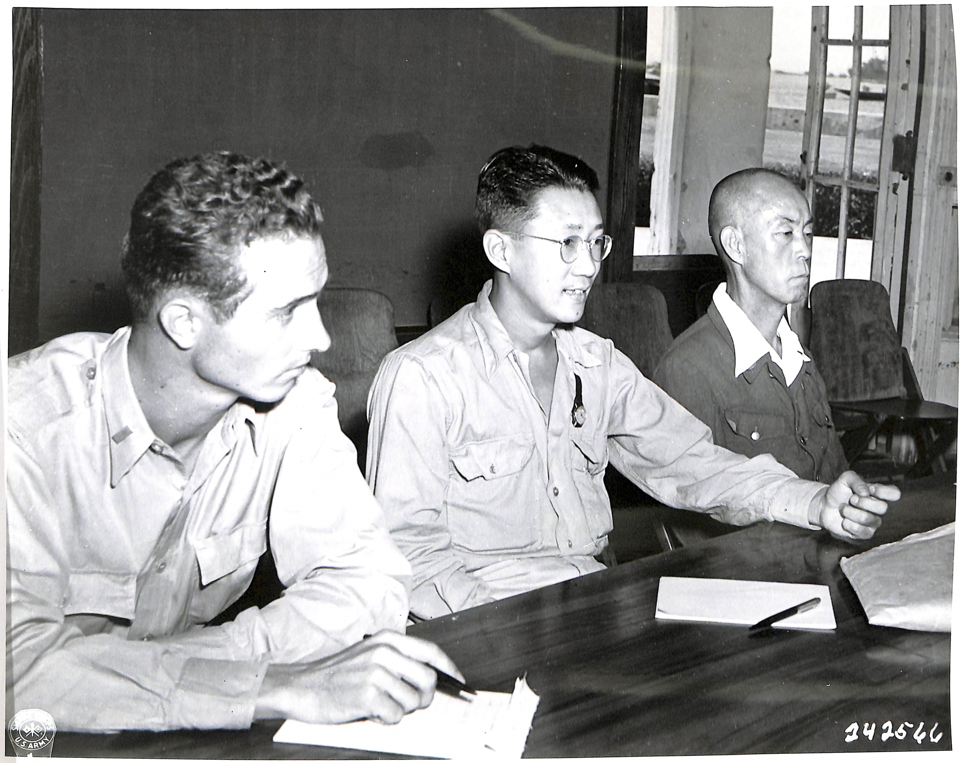 1946년 전범법정에서의 홍사익.(오른쪽 끝)